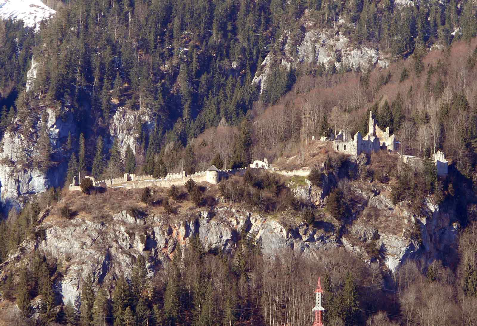 Burgruine Wolkenstein, Gemeinde Wörschach